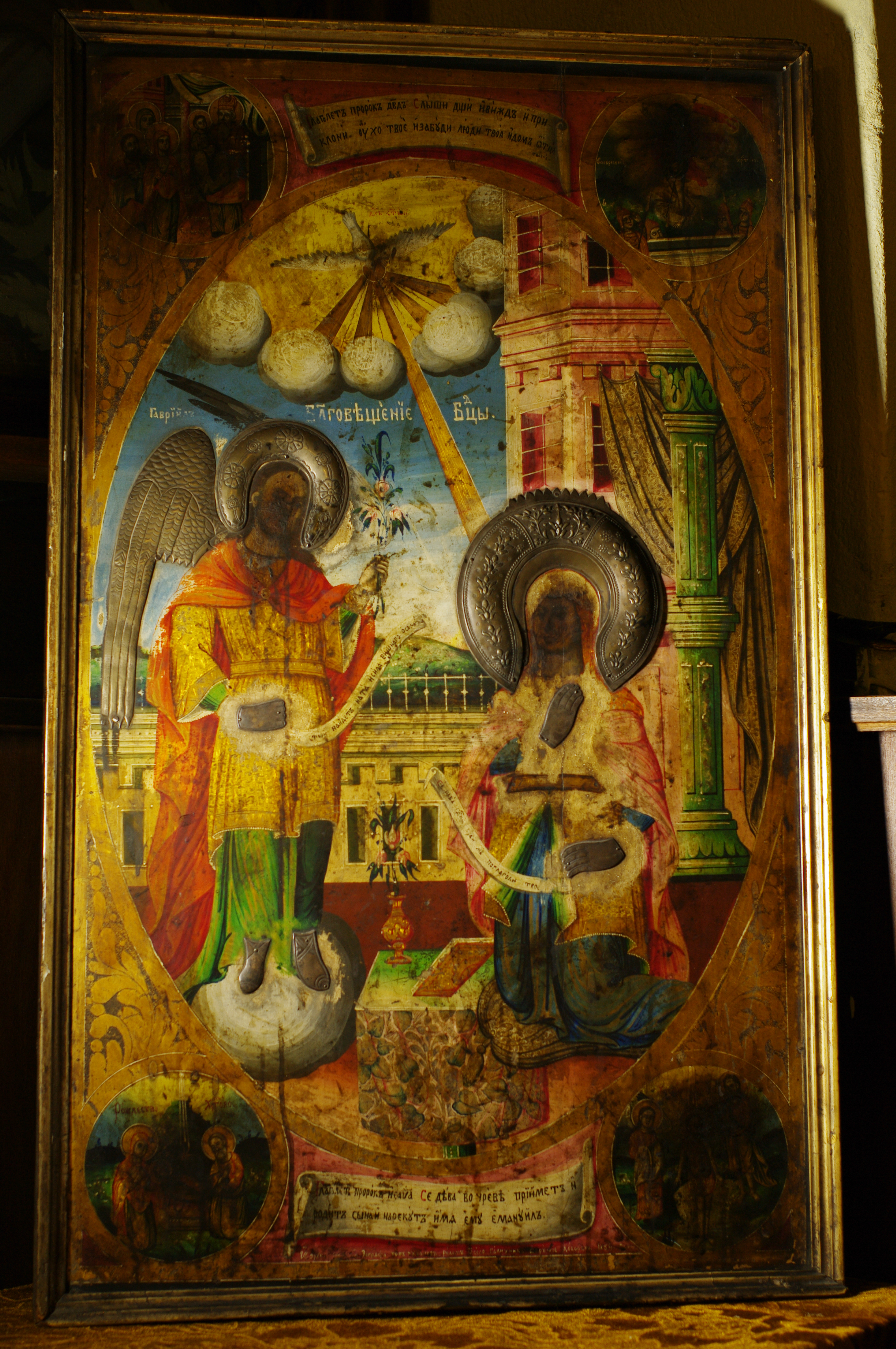 Икона Свето Благовещение от църквата „Света Параскева“ в София. Пълен изглед.